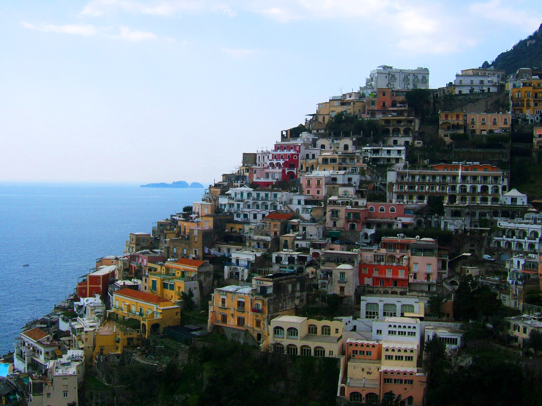 Positano, Campania, ItaliaItalian color